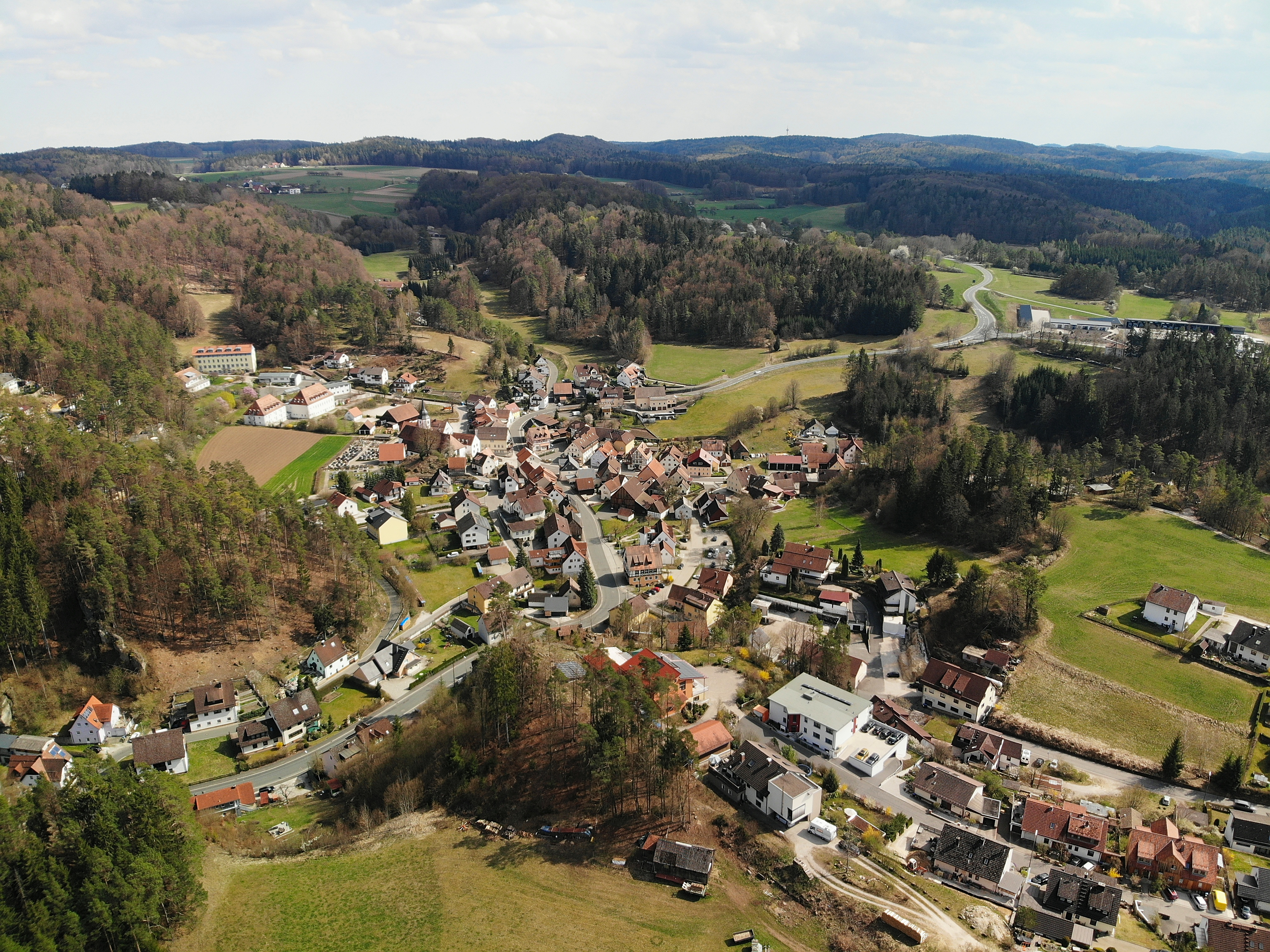 Obertrubach Luftaufnahme (2020)